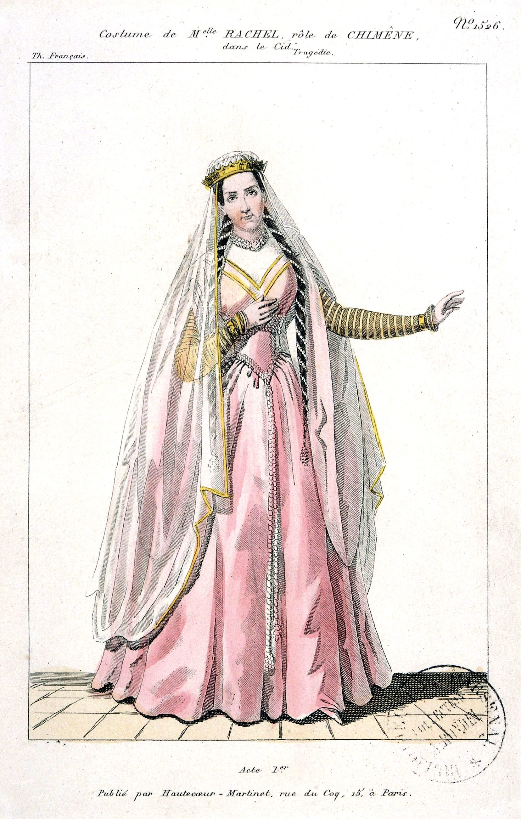 Rachel Félix, french actress of the 19th century, better known as Rachel.